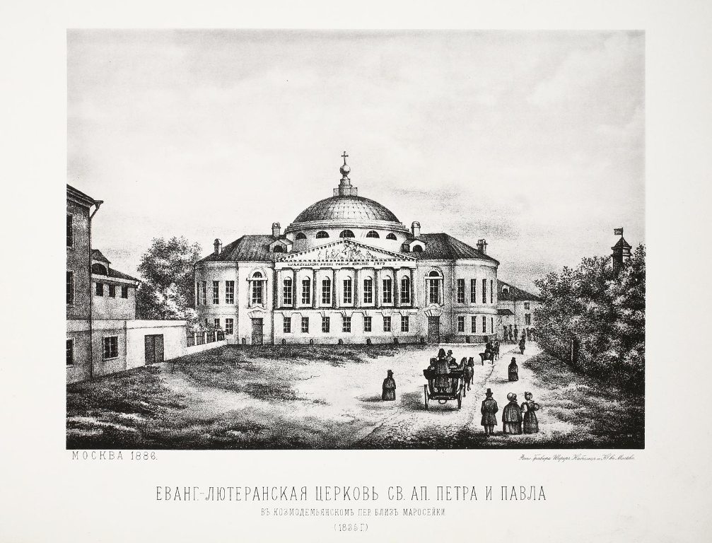 Евангелическо-лютеранская церковь свв. Петра и Павла в Москве, 1835 г.